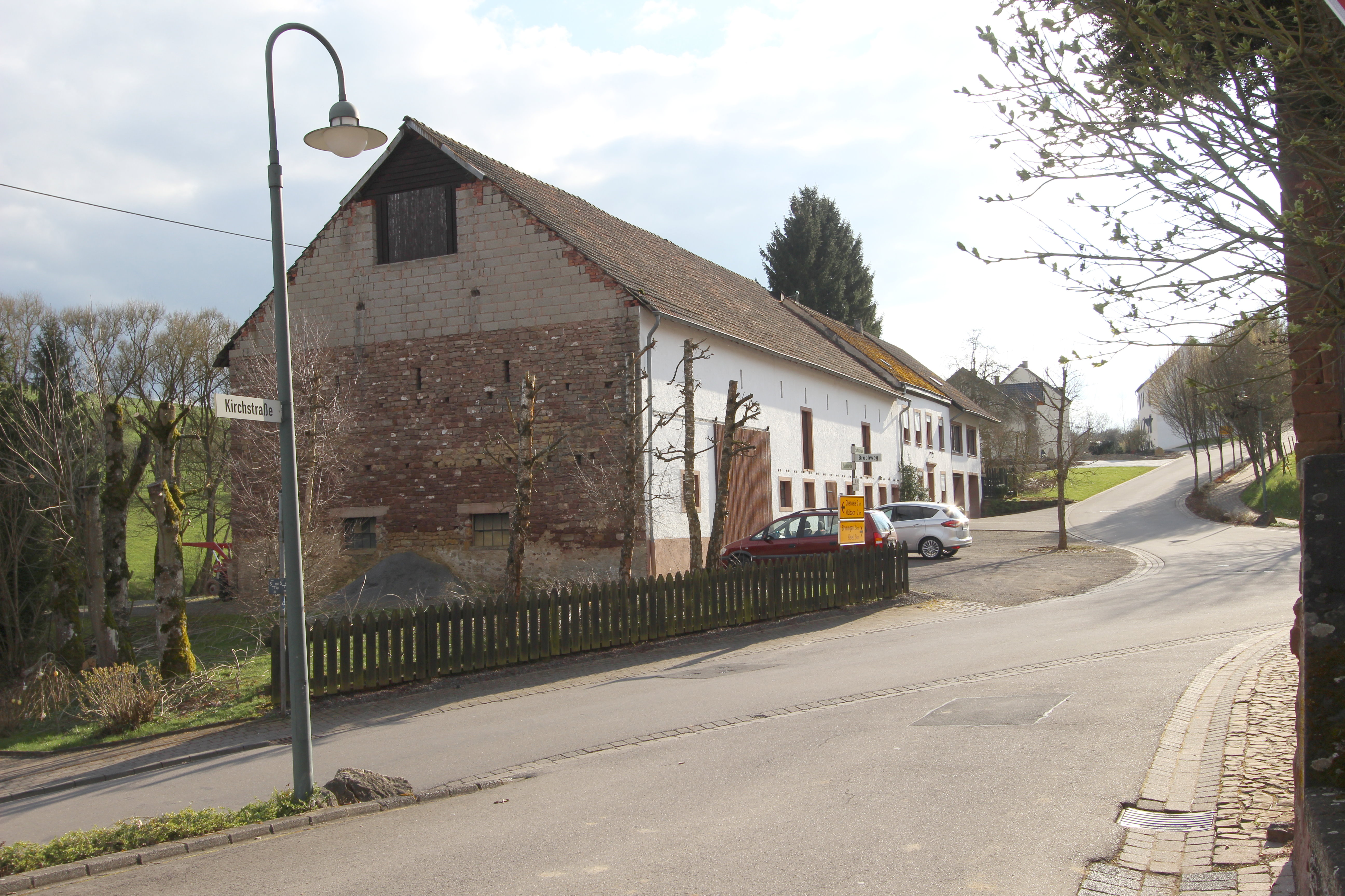 54636 Baustert; Haus Schulstraße 1. Blickrichtung aus Nord-Ost. Aufnahme von 2016.